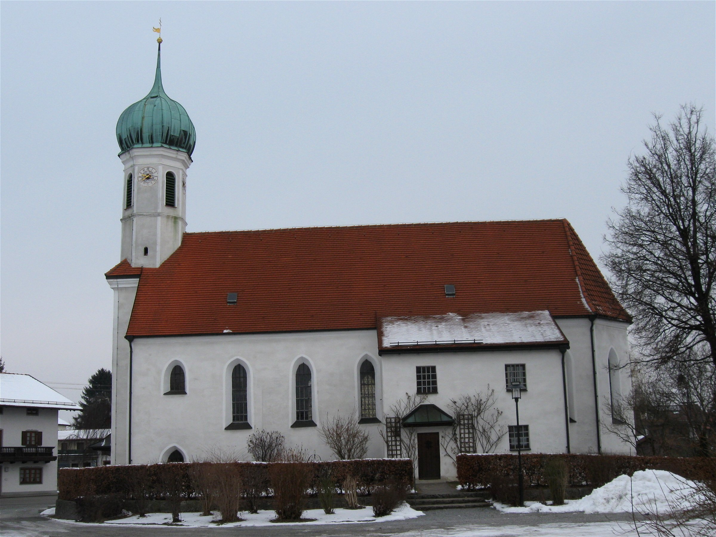 Kath. Filialkirche St. Nikolaus; spätgotisch, 15./16. Jh., im Kern z. T. spätromanisch, 13. Jh.; Pfraundorf